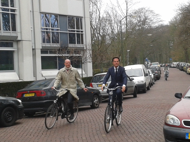 Premier Mark Rutte en VVD-fractievoorzitter arriveren op 29 maart 2012 bij het Catshuis, waar de onderhandelingen weer verder gaan, na de eerdere stop op 28 maart.